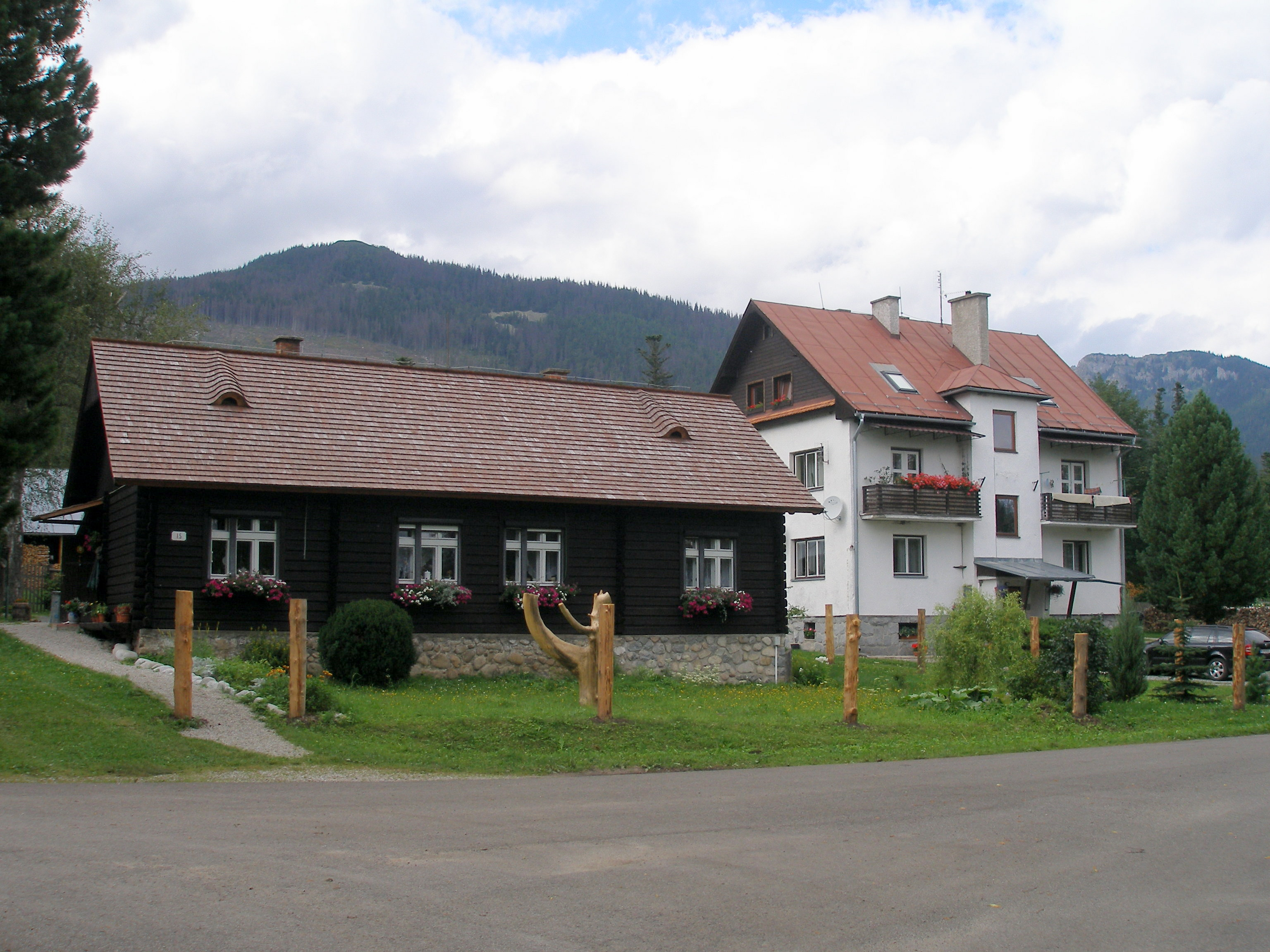 Tatranská osada Kežmarské Žľaby časť mesta Vysoké Tatry, okres Poprad, región Spiš.